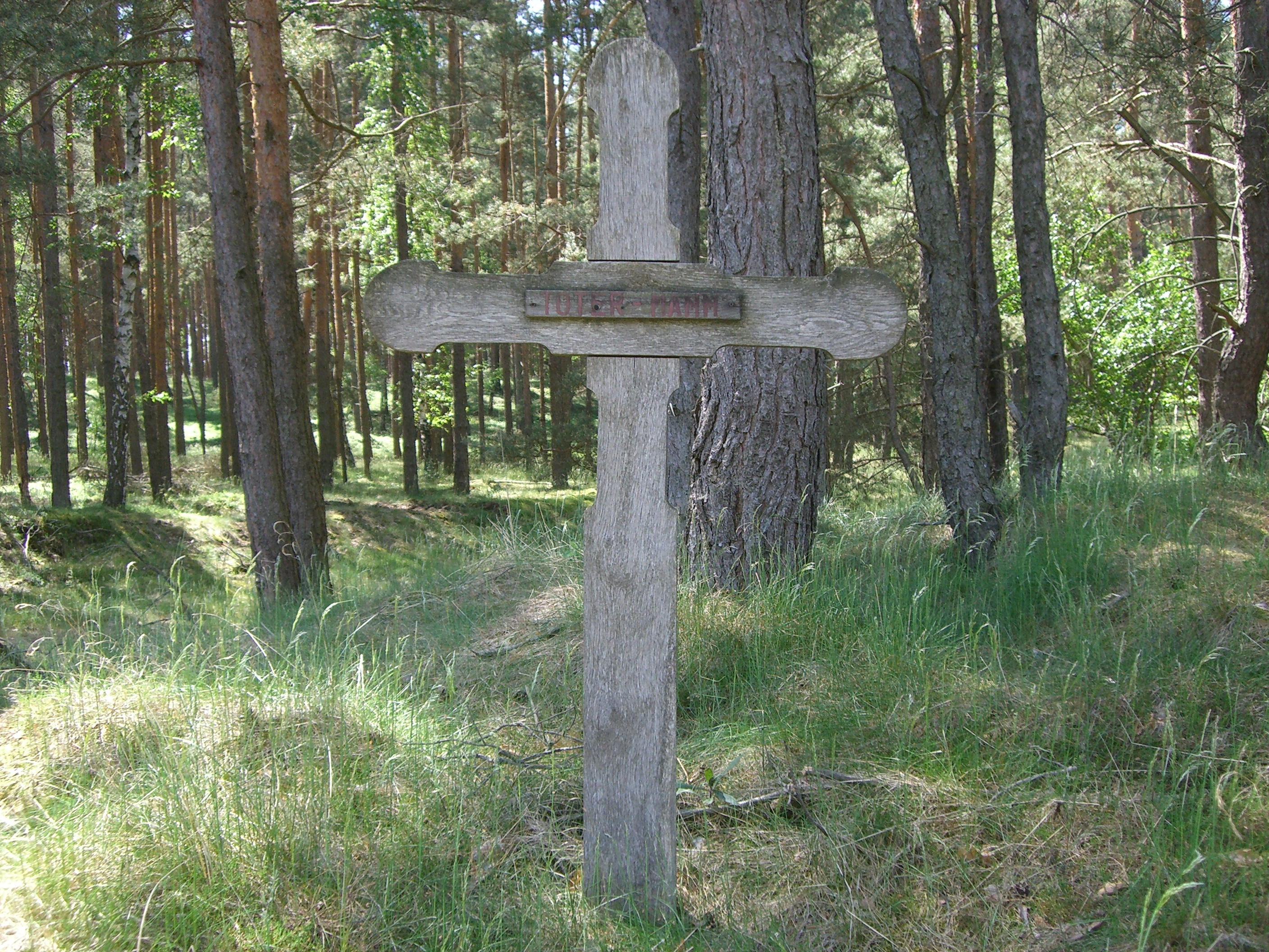 Kreuz Toter Mann Annaburger Heide – gelegen in Sachsen-Anhalt oder in Brandenburg?